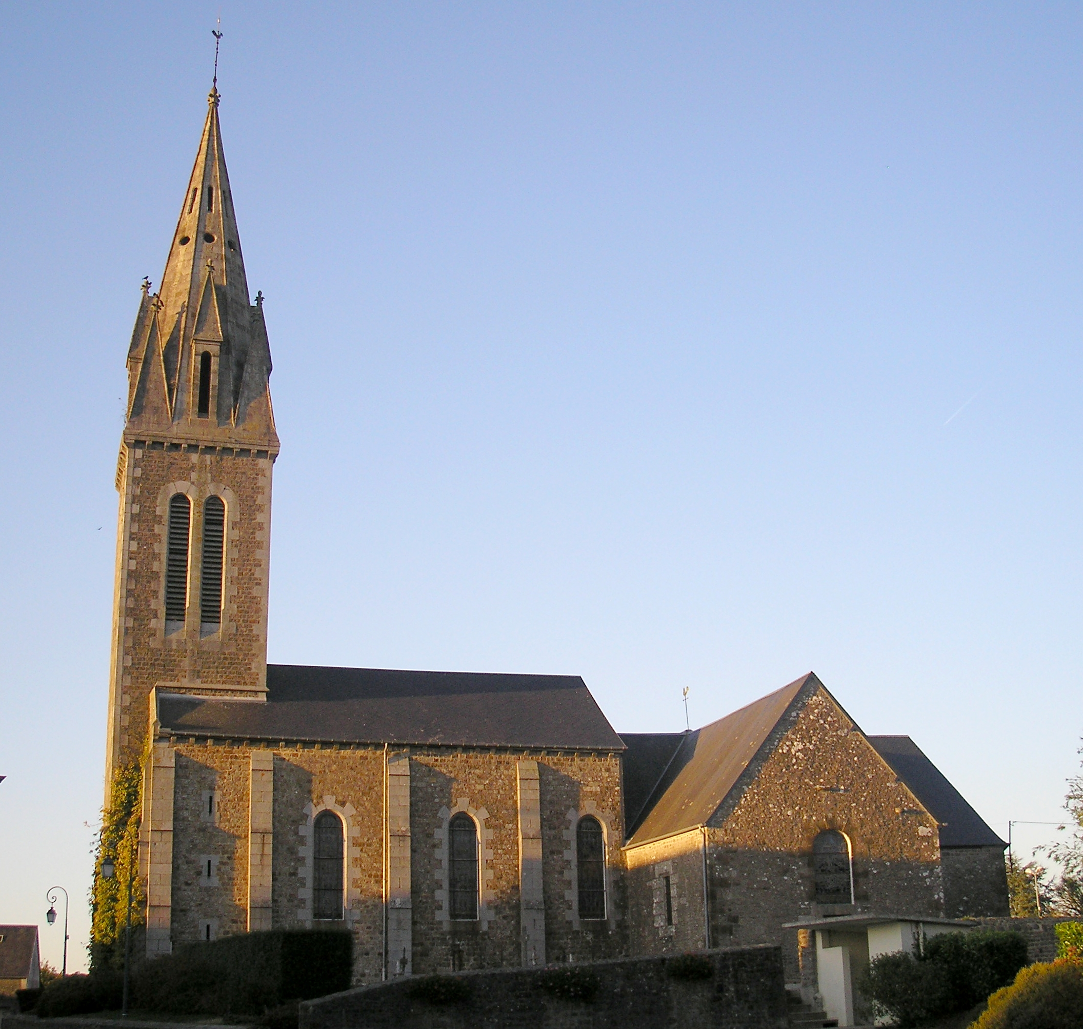 Le Grand-Celland (Normandie, France). L'église Saint-Médard.